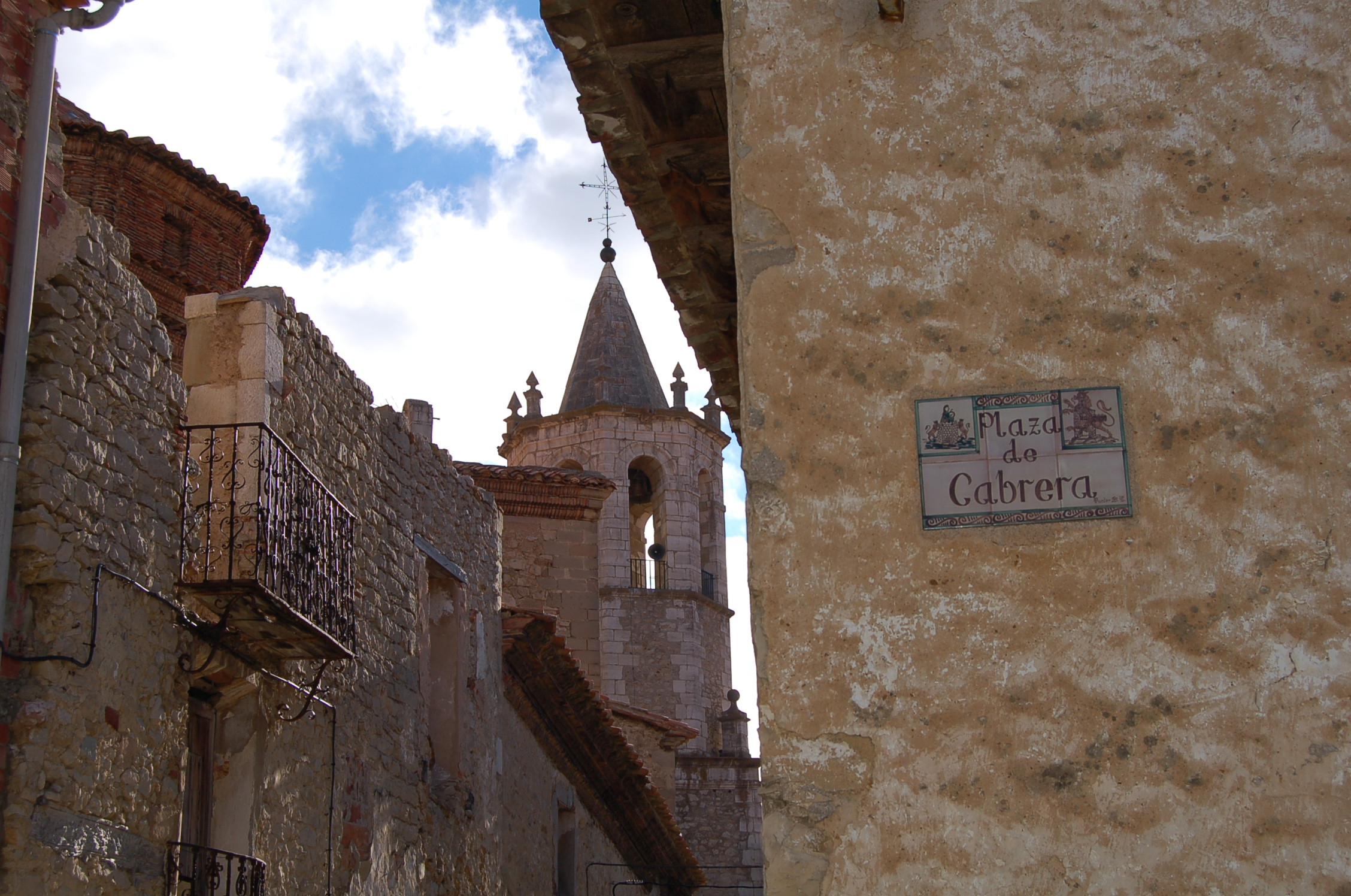 Plaza de Cabrera. Vista general. Cantavieja